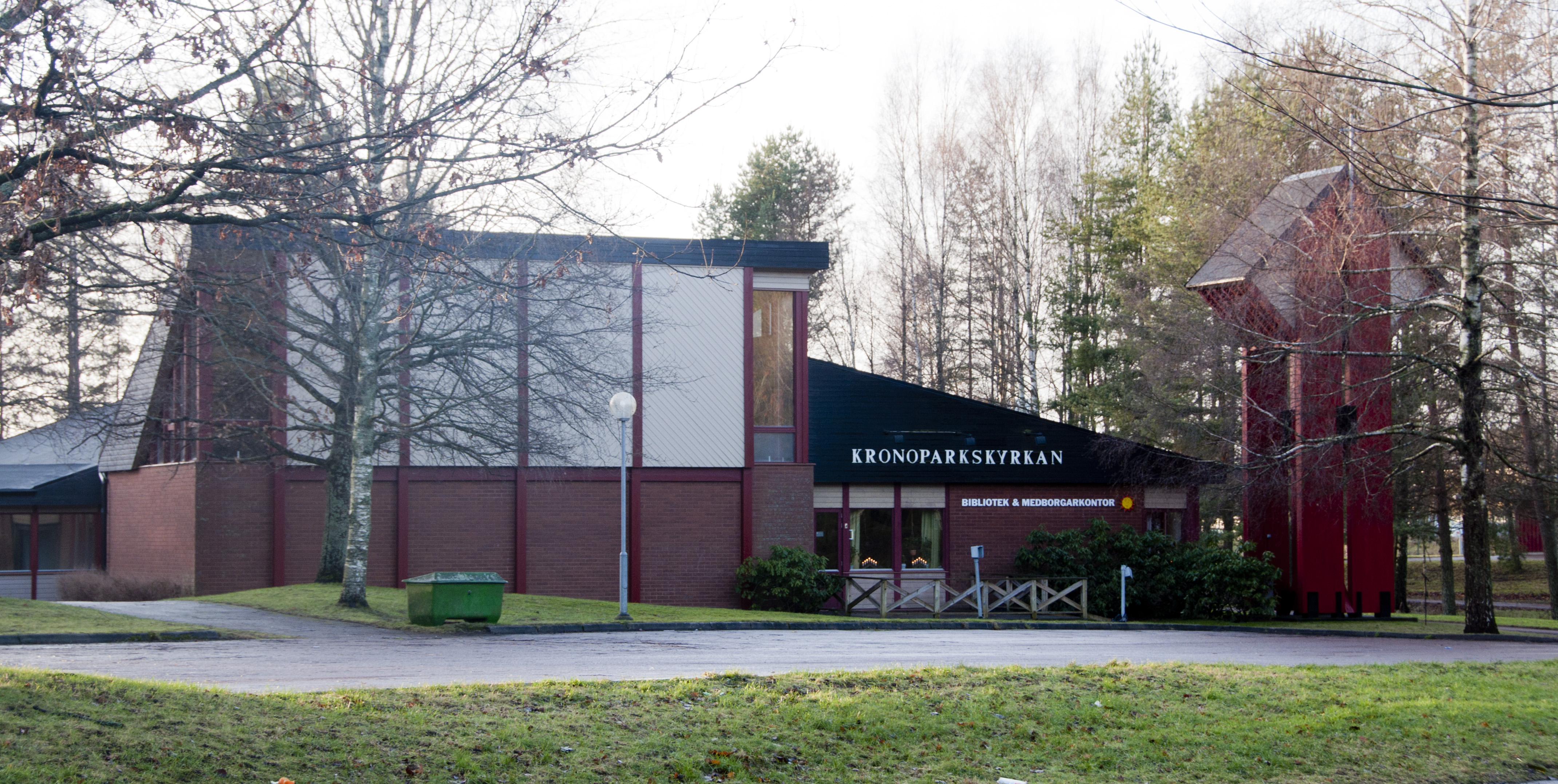 Kronoparkskyrkan. Byggnadsår 1980. Arkitekt Janne Feldt